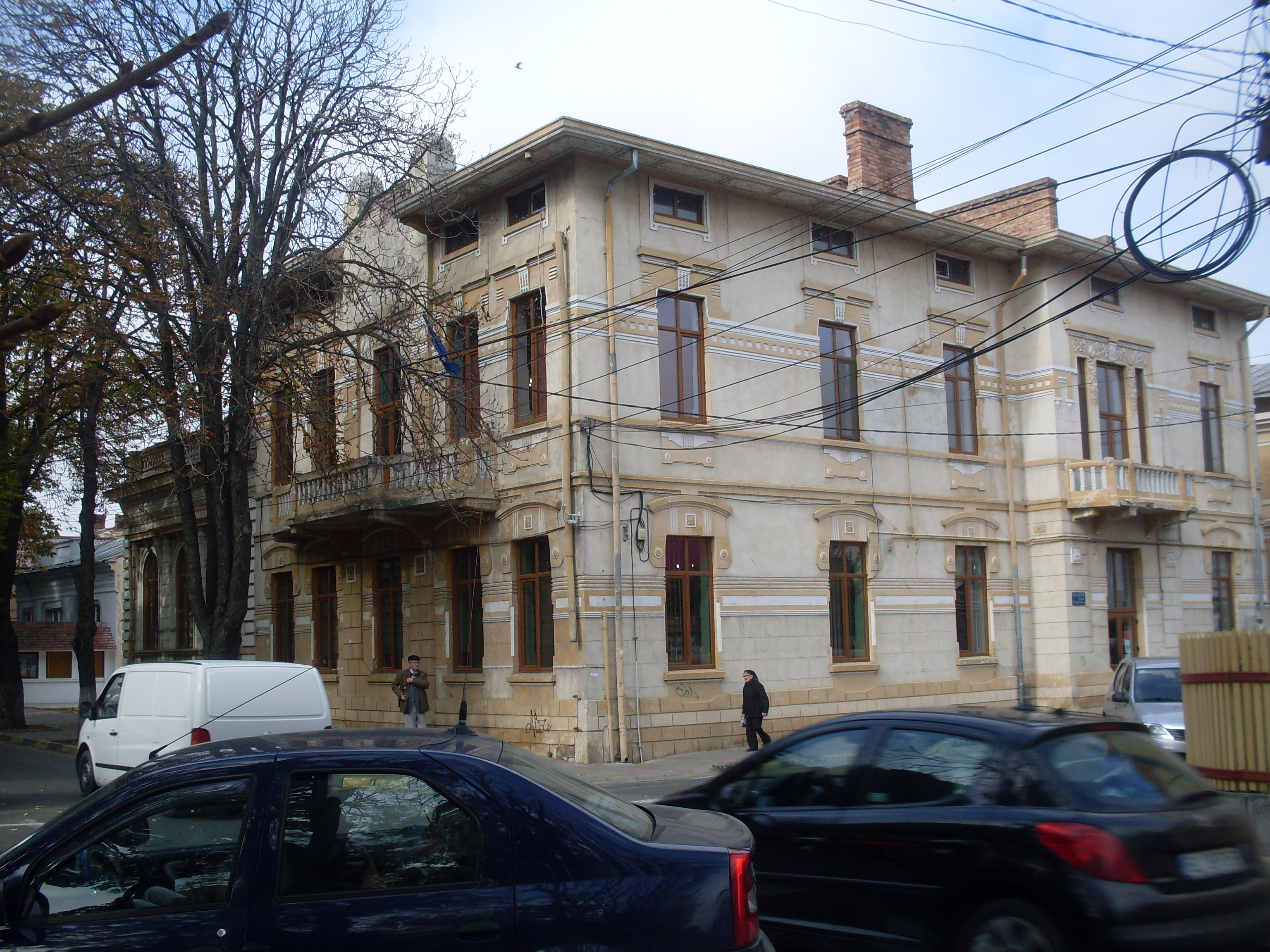 Banca Tecuci, azi Biblioteca Municipală